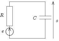 Schéma d'un circuit électrique de type RC.